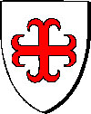 Kroaz eoriek